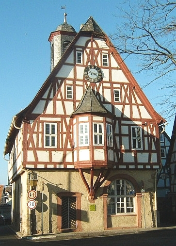 LIZENZ